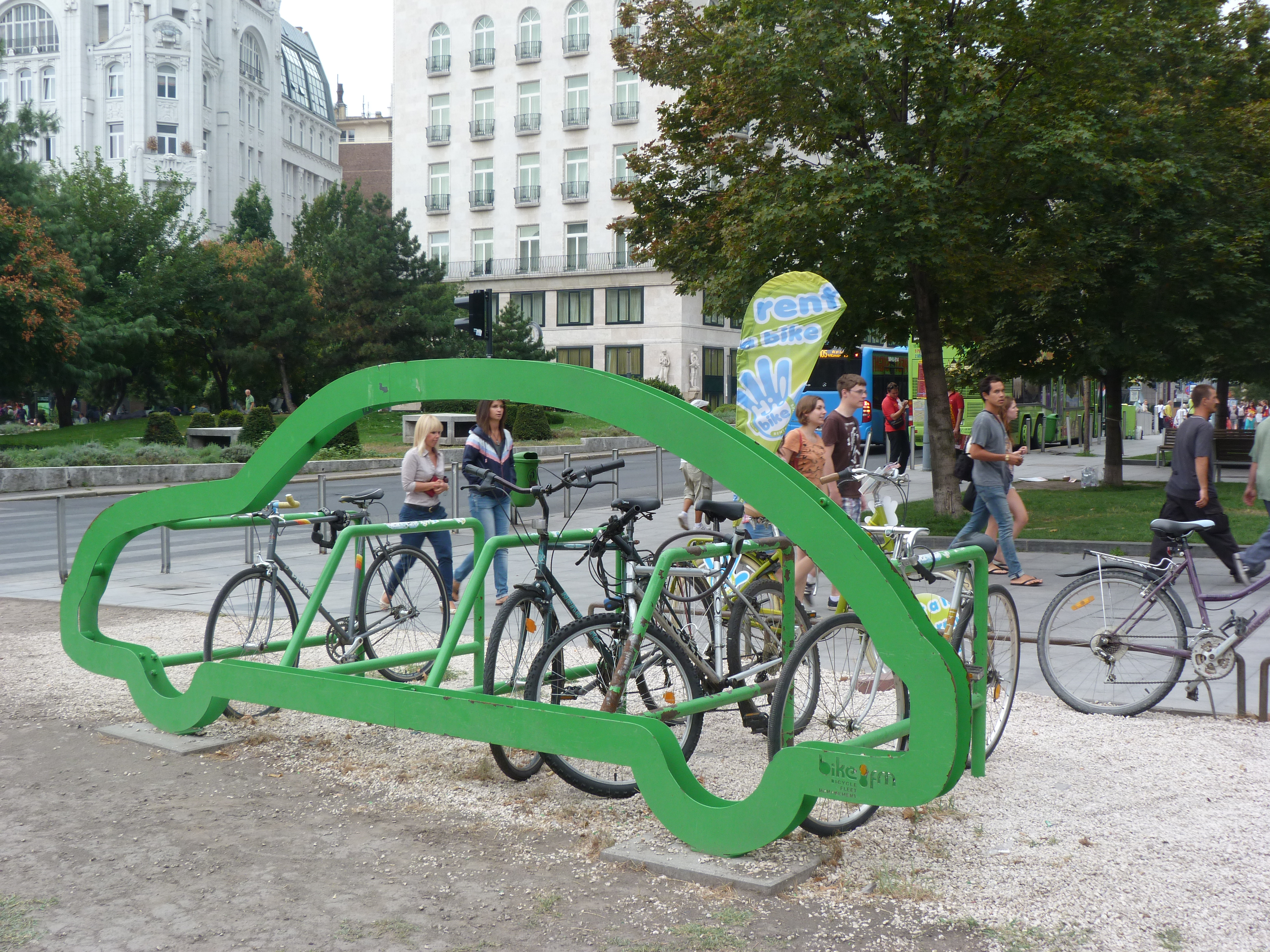 A felvétel 2013. Augustus 26 –án készült Budapesten. Belváros, Deák tér. Rent a bike állomás. ©© Derzsi Elekes Andor, Budapest, 2013, You are authorised to use these photos and vids under Creative Commons – even for commercial, for profit purposes. Photos must be attributed to Derzsi Elekes Andor. All of the photos and vids in the Metapolisz DVD line are under Creative Commons and can be used even for commercial – for profit – purposes. Recommended Citation Derzsi Elekes Andor: Metapolisz DVD line